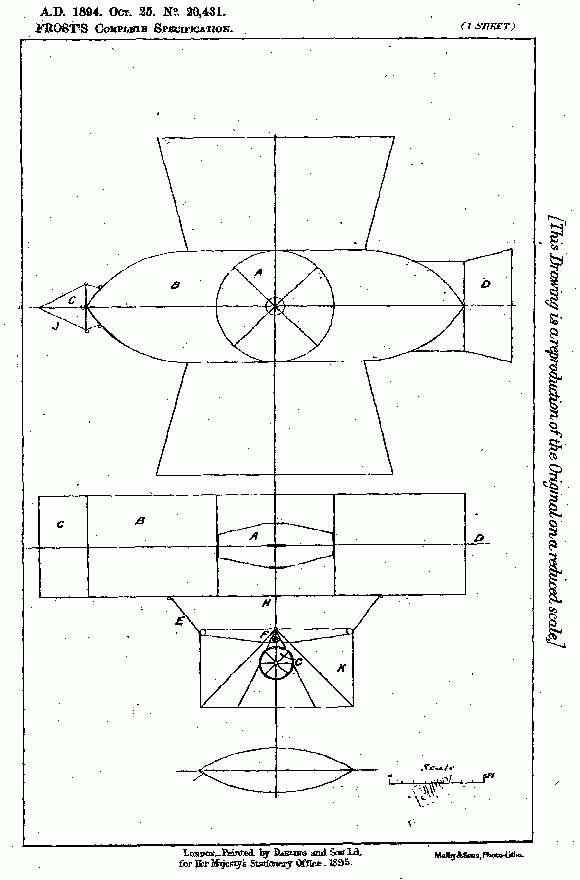 Patent BP 189420431